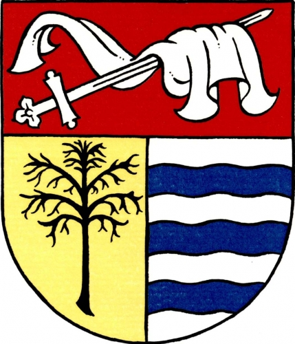 znak, Přívětice, okres Rokycany